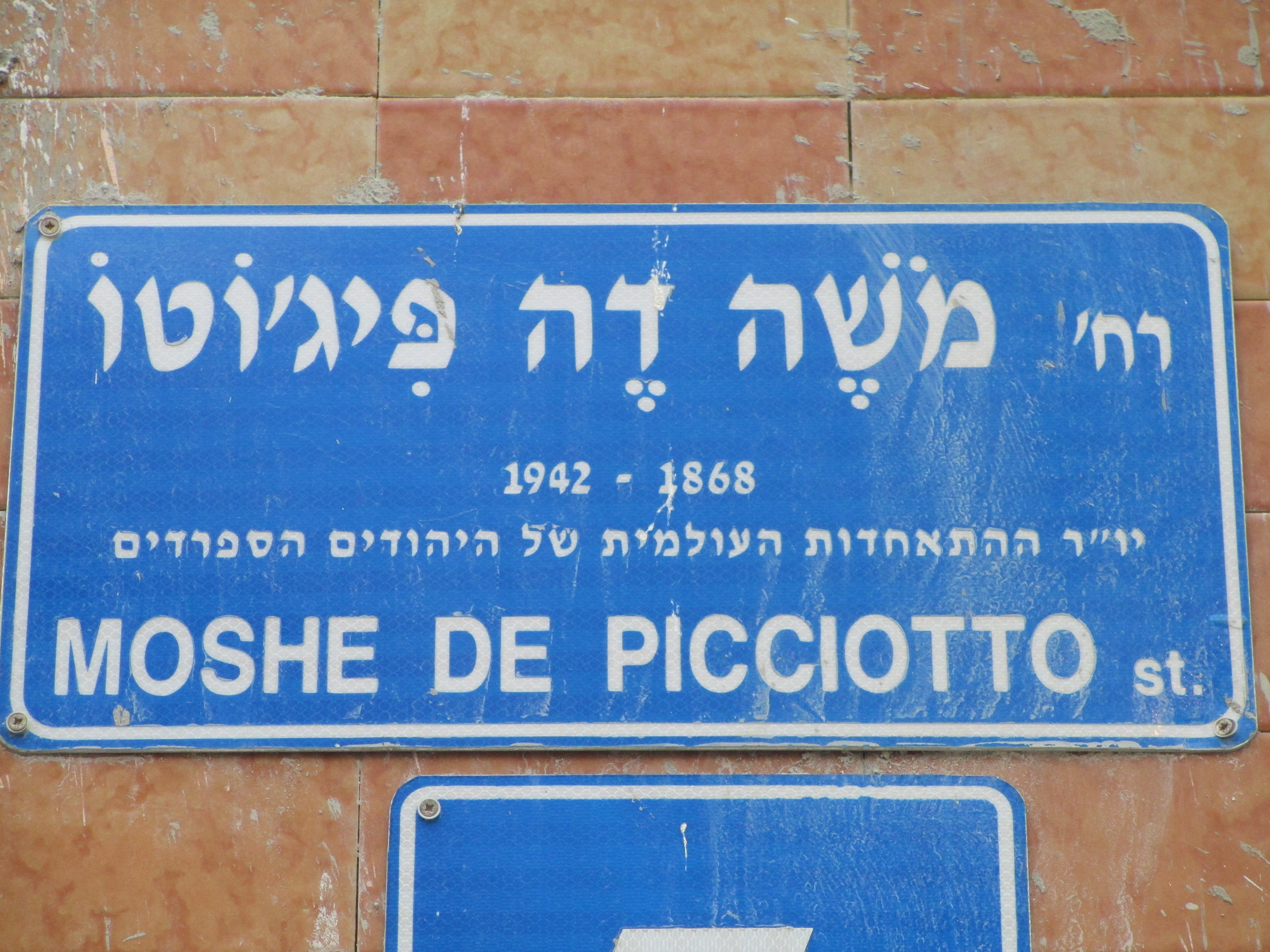 שלט רחוב דה פיג'וטו בתל אביב